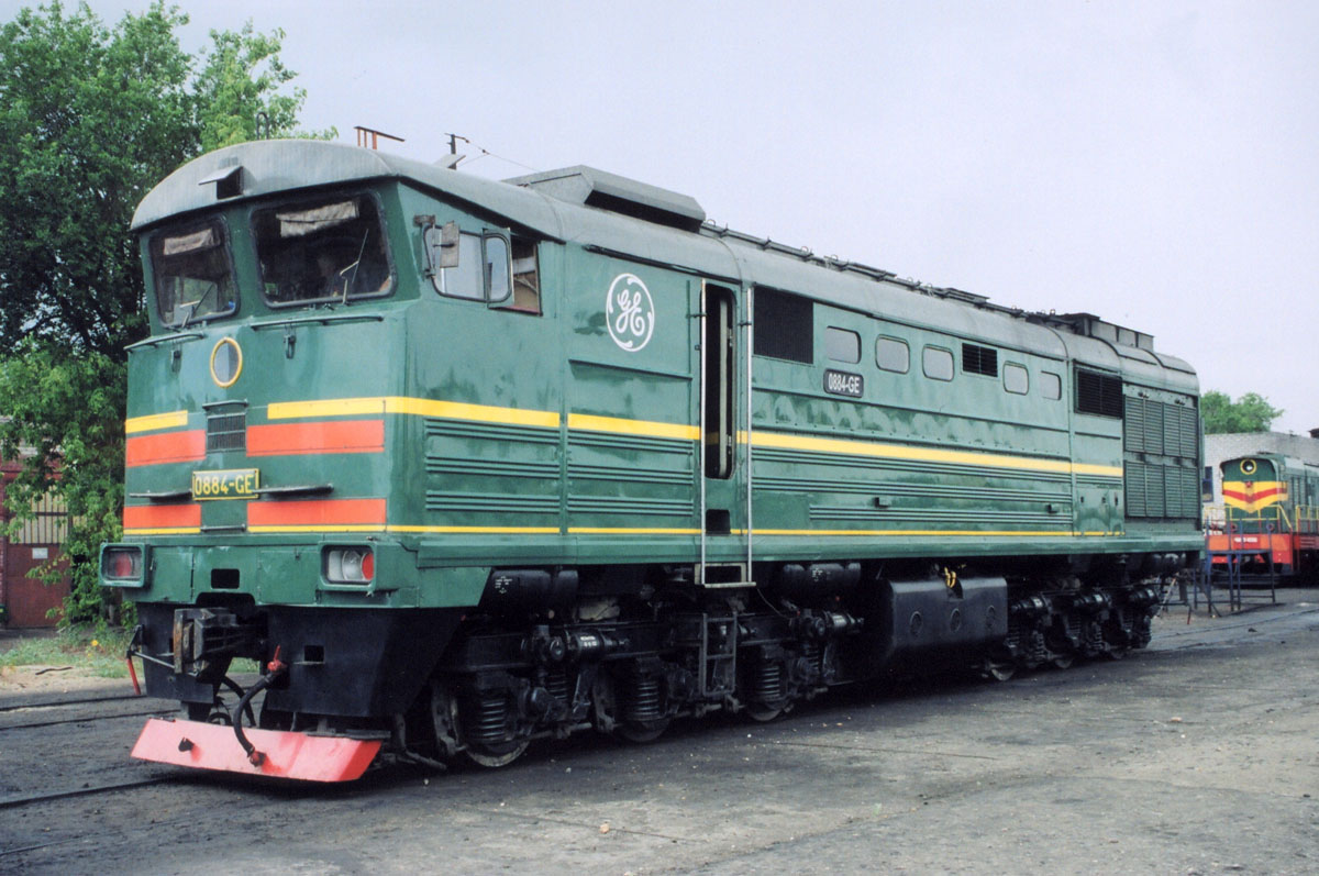 Тепловоз 0884 GE (ТЭ10М-0884 GE, бывший 2ТЭ10М-0884) на станции Верхний Баскунчак